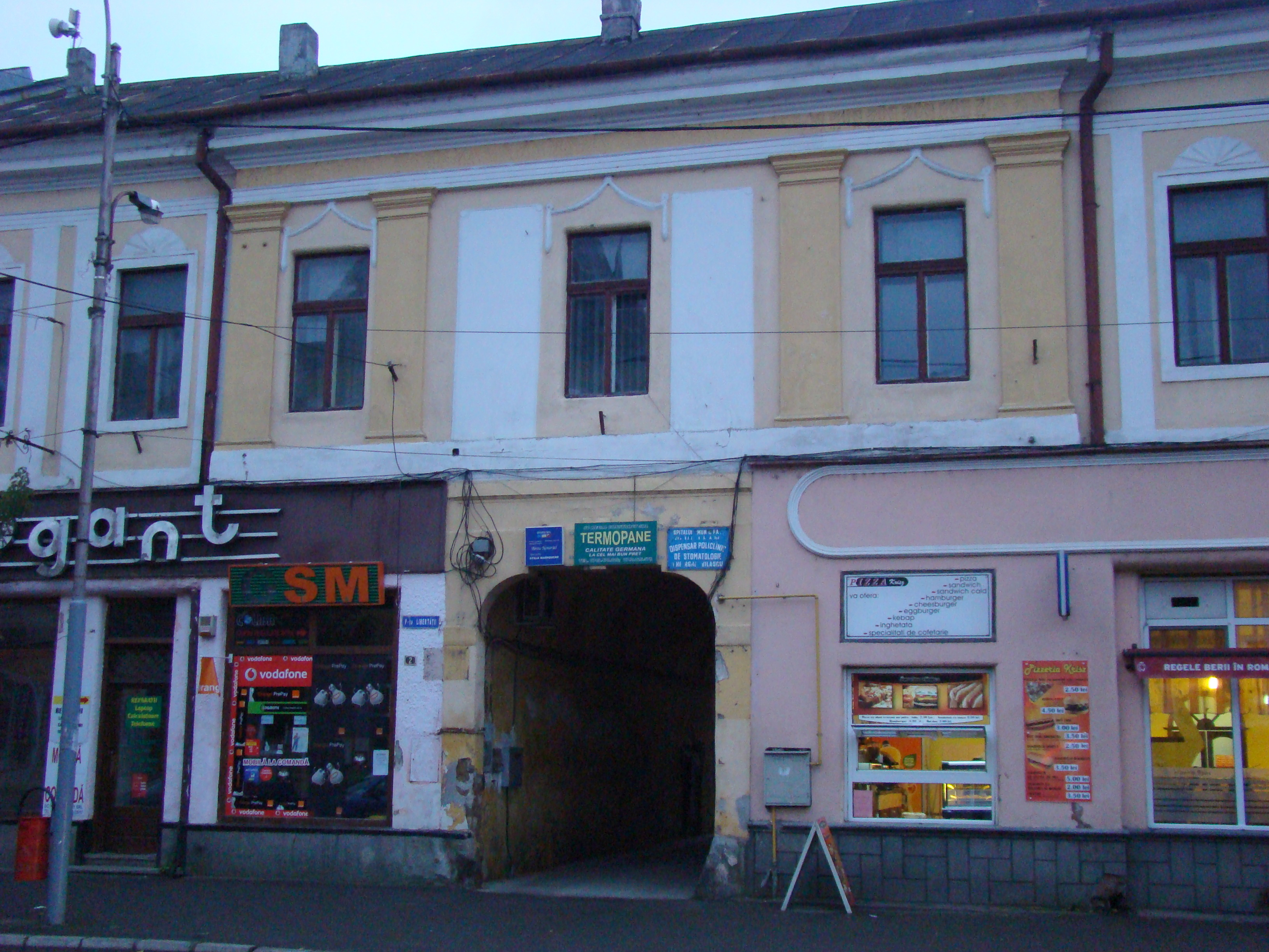 Casă, municipiul Sighetu Marmației, Piața Libertății 2